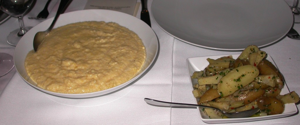 Plat de polenta